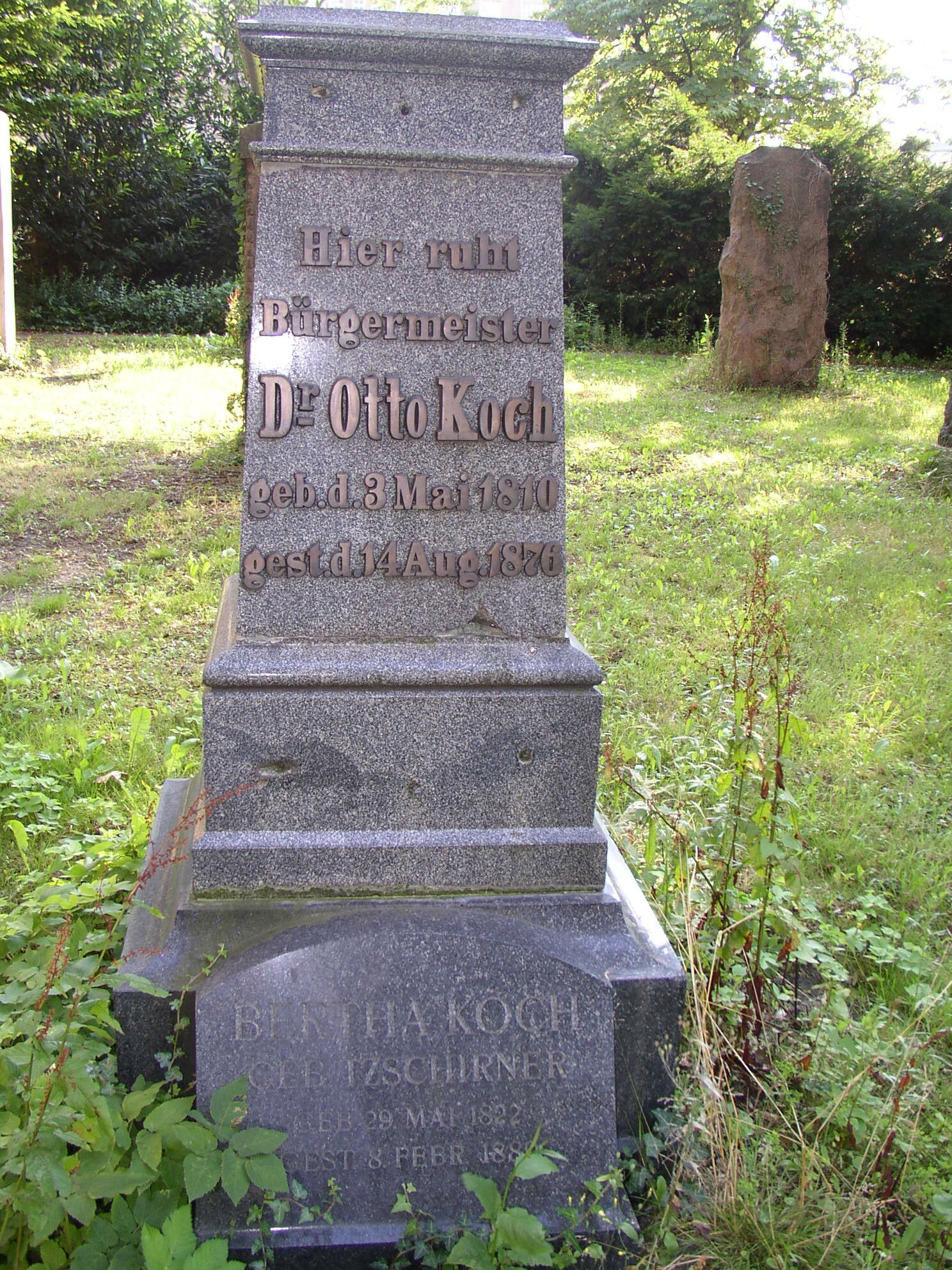 Koch_Grabstein_Leipzig am 3.8.2004 auf dem Alten Johannisfriedhof Leipzig selbst fotografiert